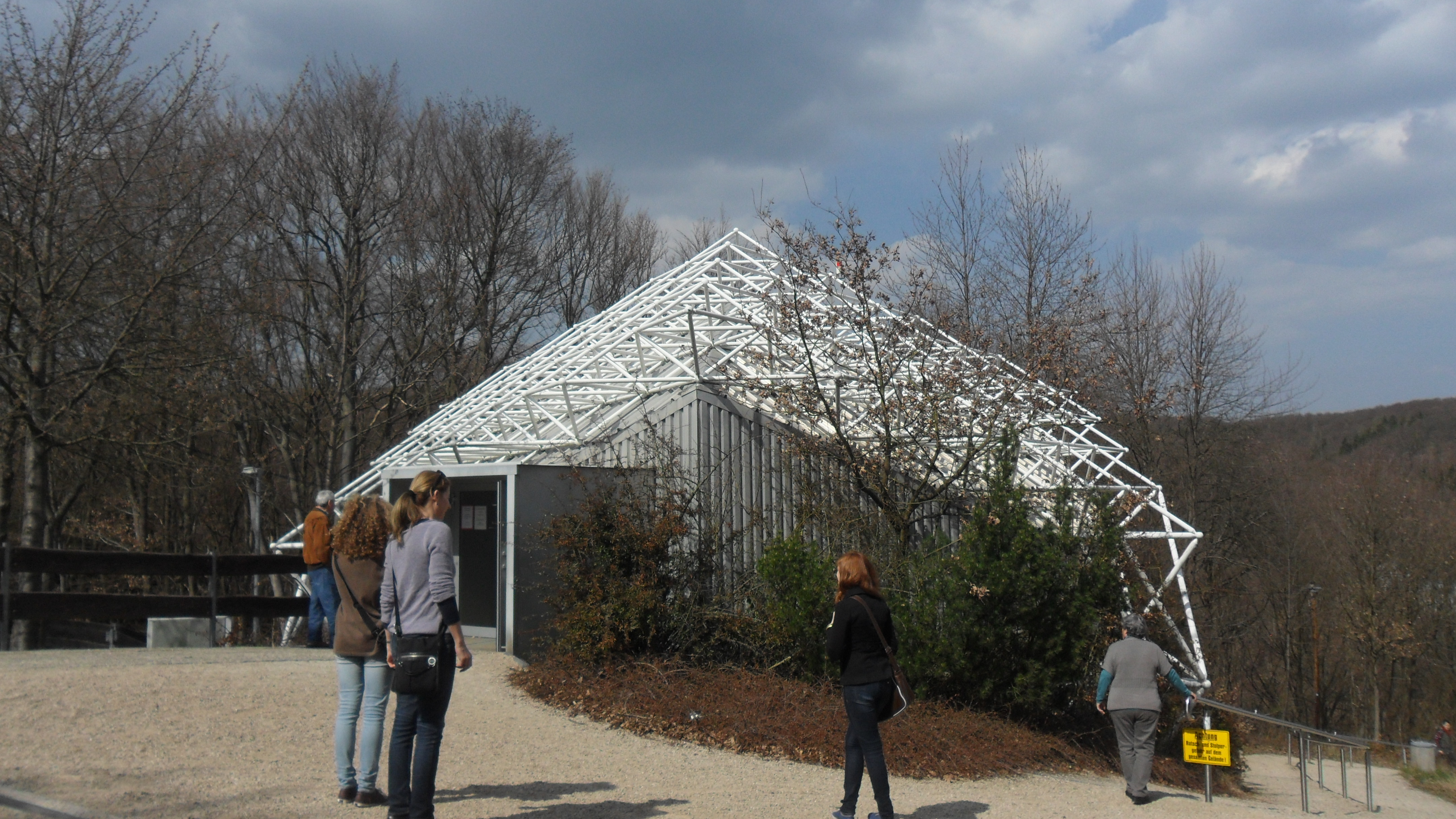 Vorstellungsraum am Radioteleskop Effelsberg bei Bad Münstereifel